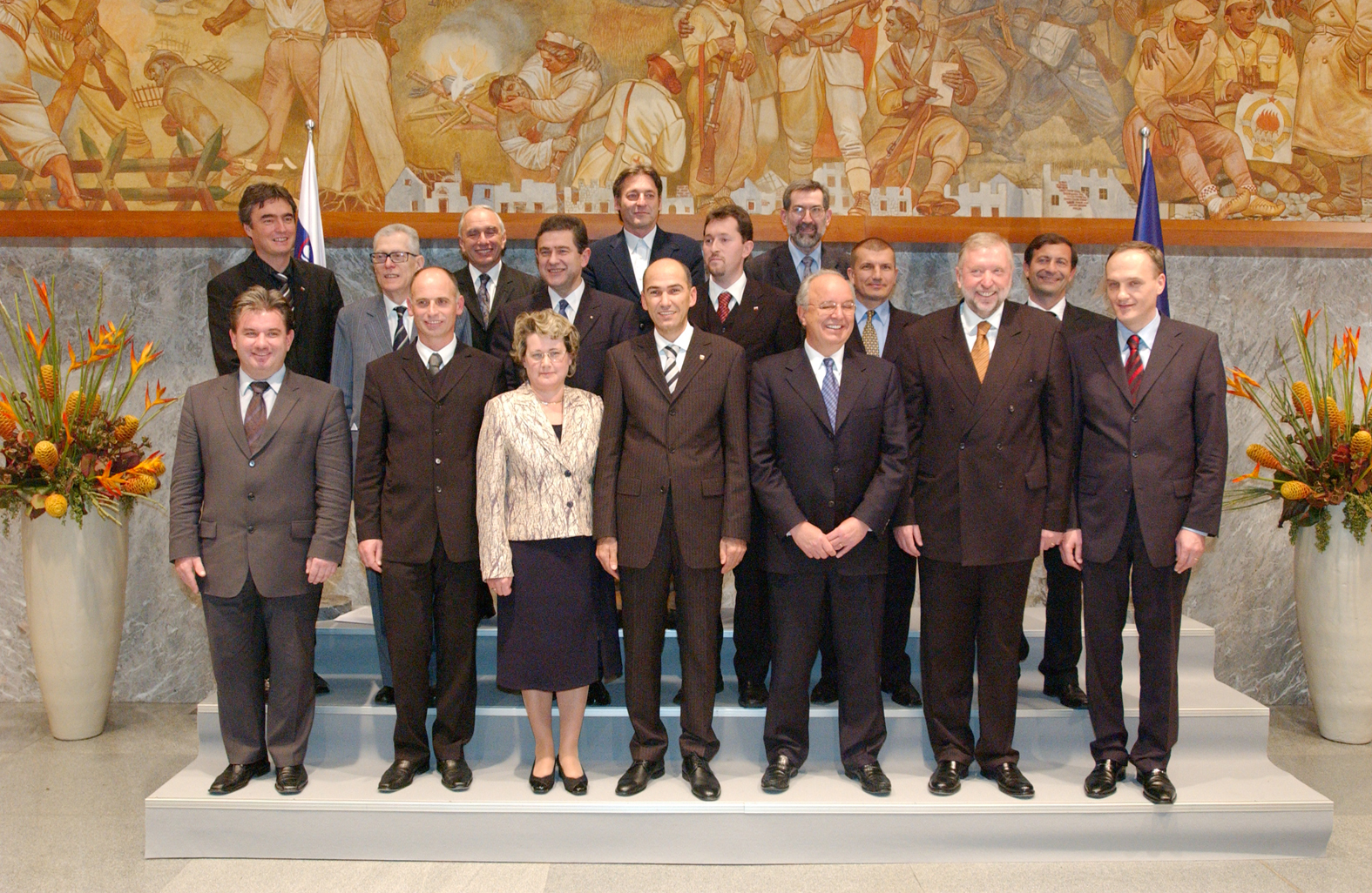 8. vlada Republike Slovenije.